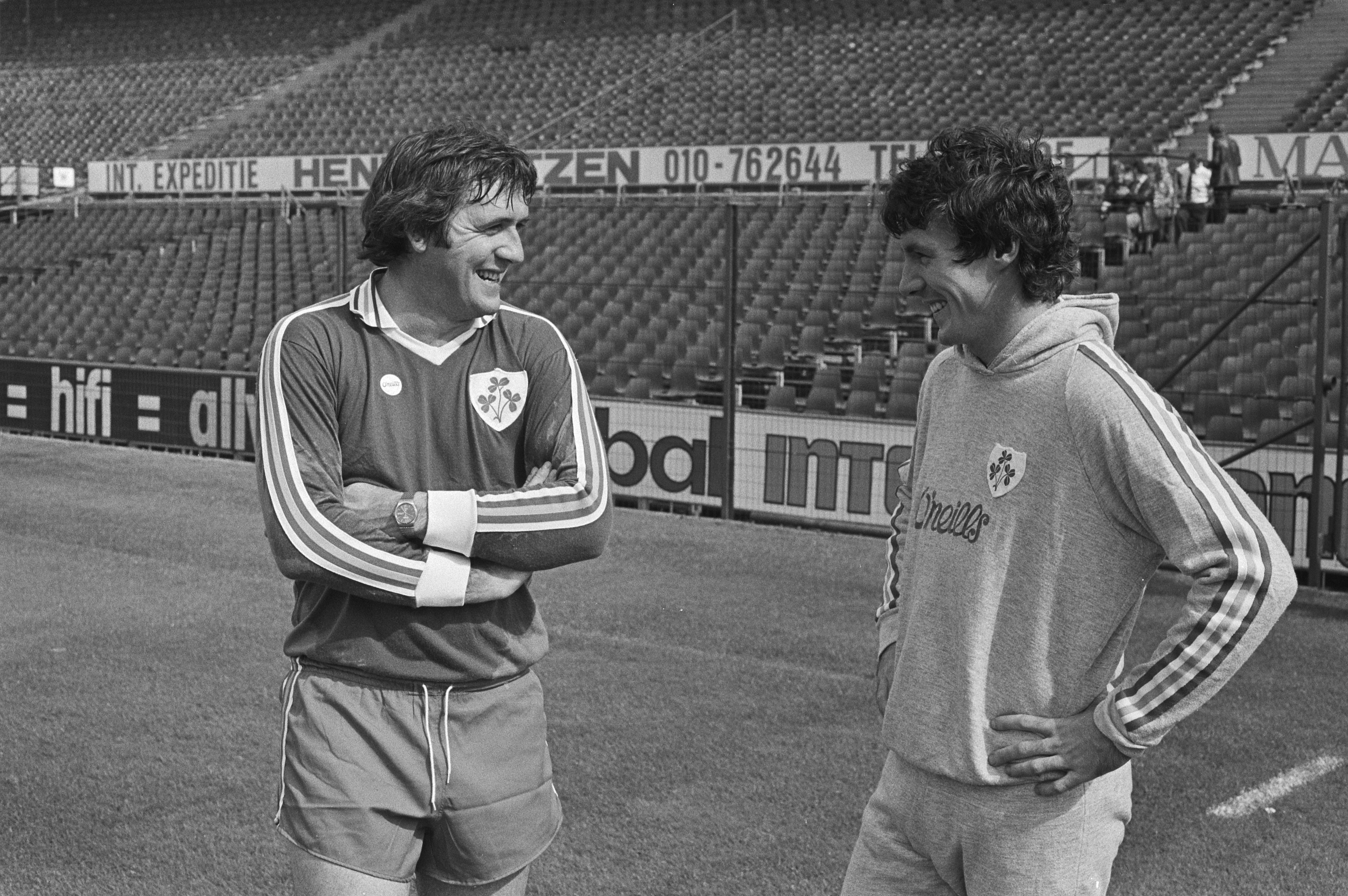 Collectie / Archief : Fotocollectie Anefo Reportage / Serie : Training van het elftal van Ierland in verband met de wedstrijd tegen Nederland Beschrijving : De manager van Ierland, Ian Hand (links) in gesprek met speler Frank Stapleton tijdens een training in verband met een interlandwedstrijd tegen Nederland Datum : 7 september 1981 Locatie : Ierland, Nederland Trefwoorden : managers, sport, voetbal, voetballers, wedstrijden Persoonsnaam : Hand, Ian, Stapleton, Frank Fotograaf : Antonisse, Marcel / Anefo, [onbekend] Auteursrechthebbende : Nationaal Archief Materiaalsoort : Negatief (zwart/wit) Nummer archiefinventaris : bekijk toegang 2.24.01.05 Bestanddeelnummer : 931-6646